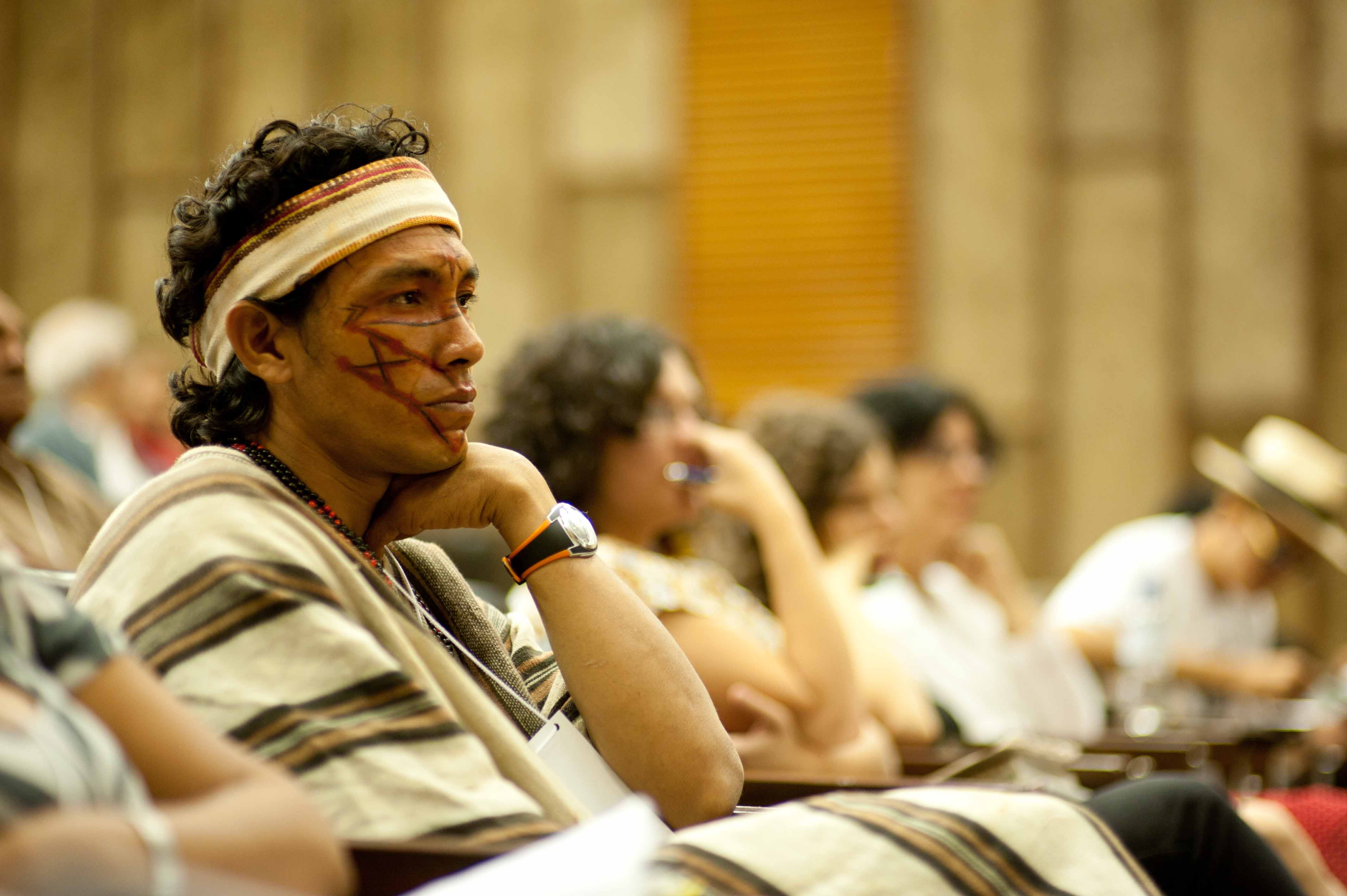 Benki Ashaninka - Presidente do Centro Saberes da Floresta (Yorenka Ãtame), do Povo Ashaninka (AC). Desenvolve um trabalho de conhecimento da floresta comprometido com a proteção ambiental e o reflorestamento Foto: Pedro França/MinC